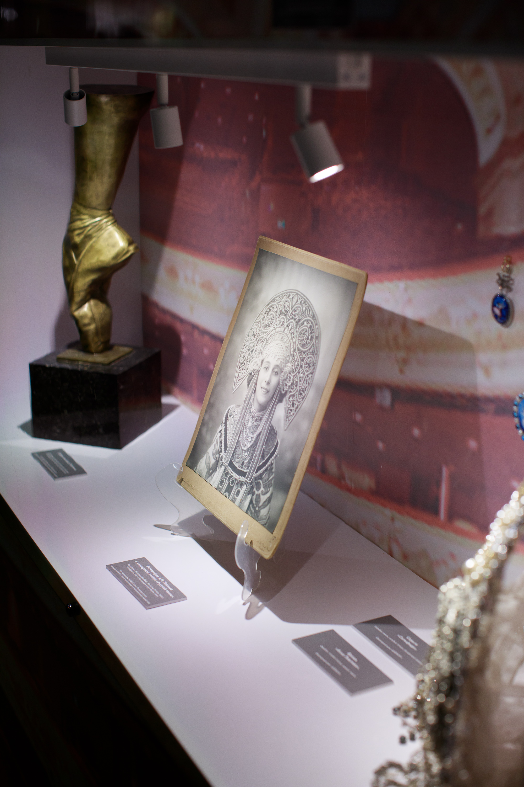 выставка "В гостях у Юсуповых", Галерея парадных залов Юсуповского дворца на Мойке